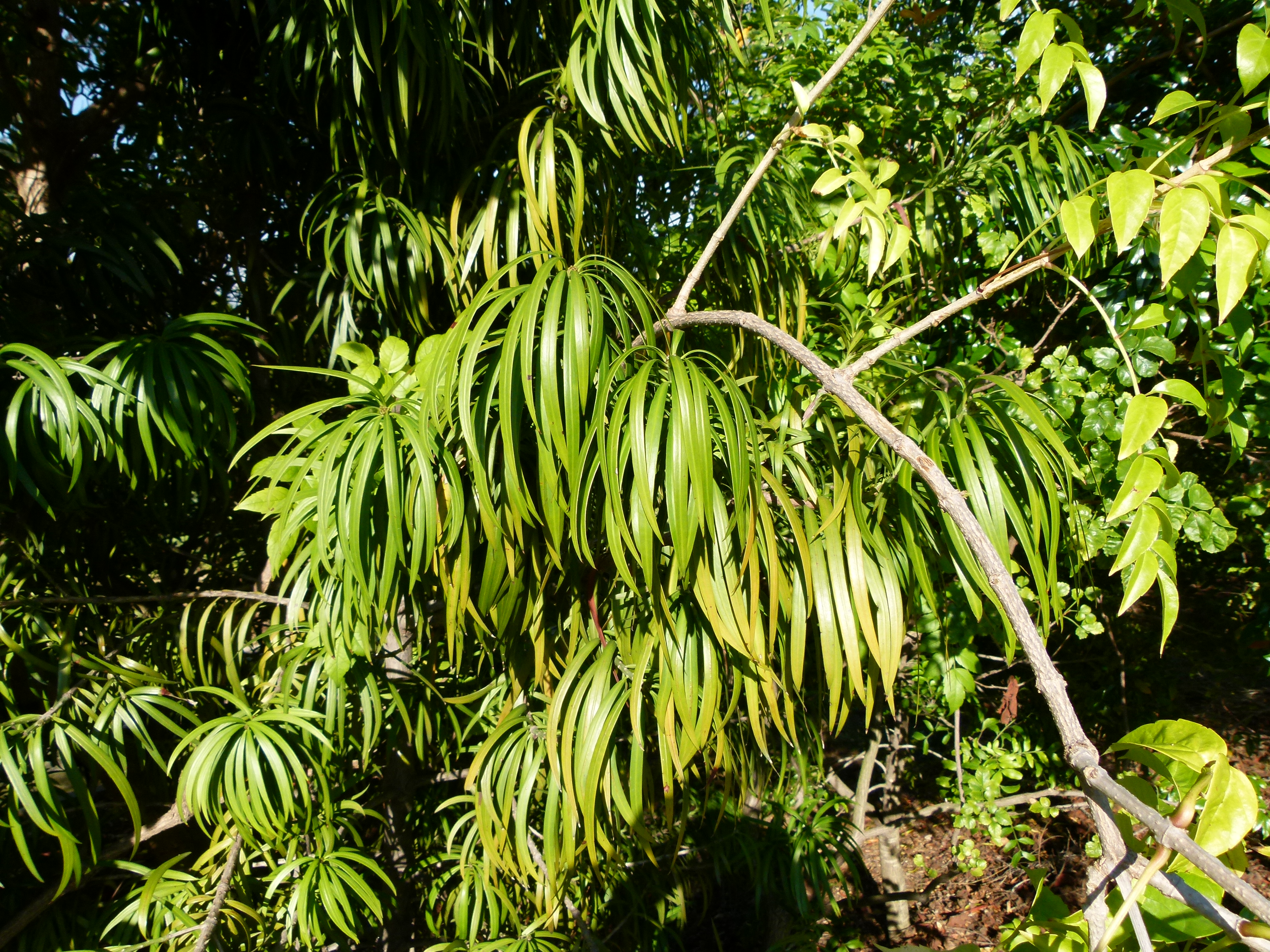 Jardin botanique de Barcelone